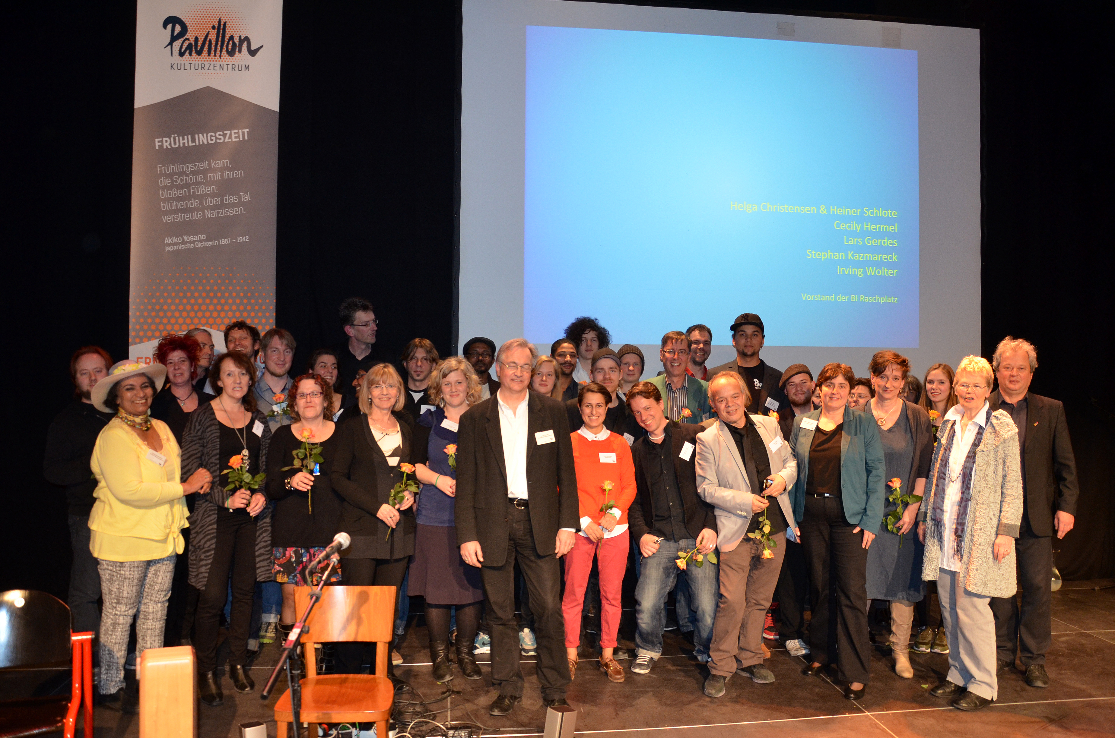 Nach und nach durch den Vorstand auf die Bühne gerufen, stellte sich zum Frühlingsempfang 2014 nun das gesamte Team des Raschplatz Kulturzentrums dem Publikum gestellt ...